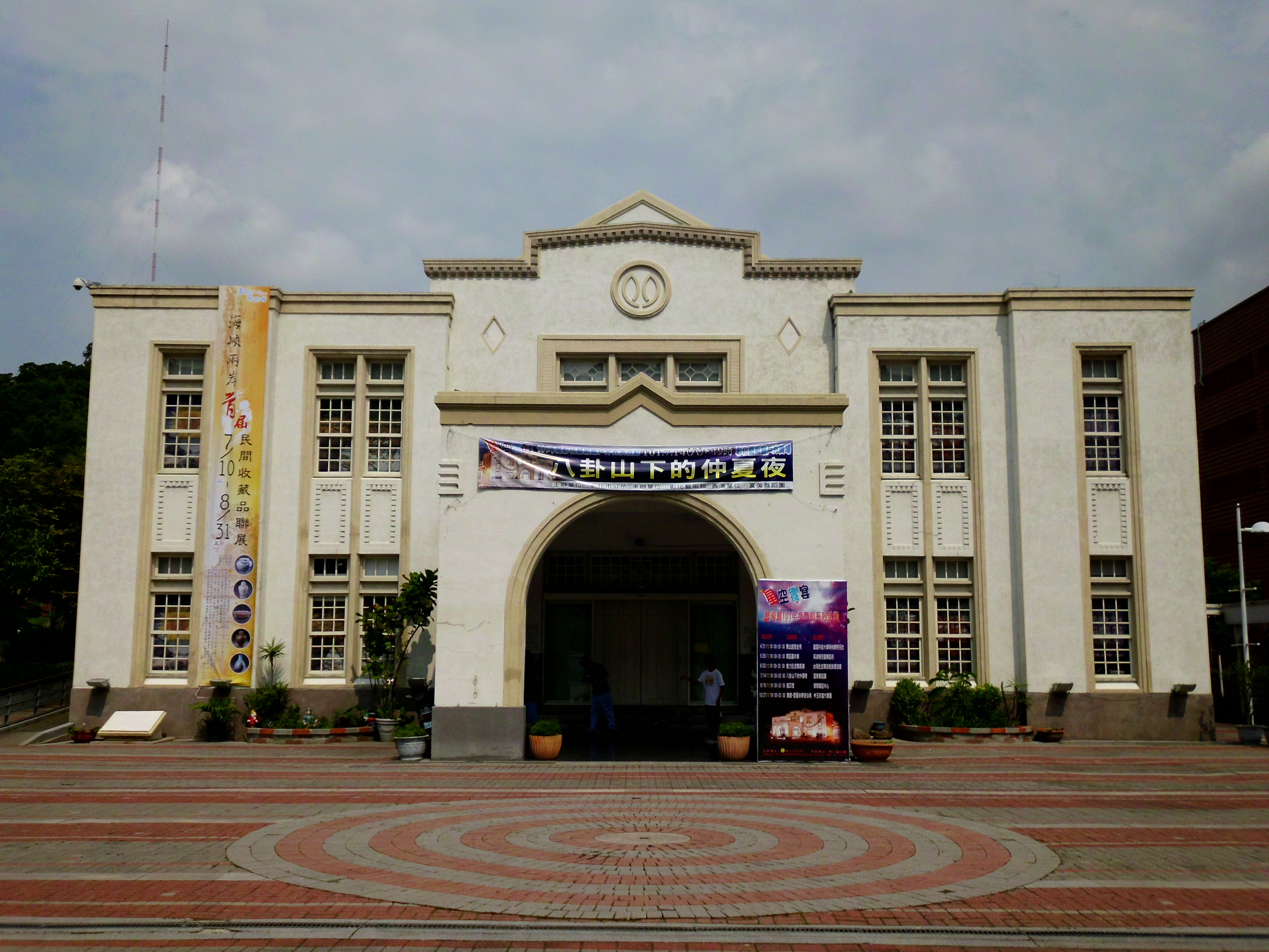 彰化藝術館